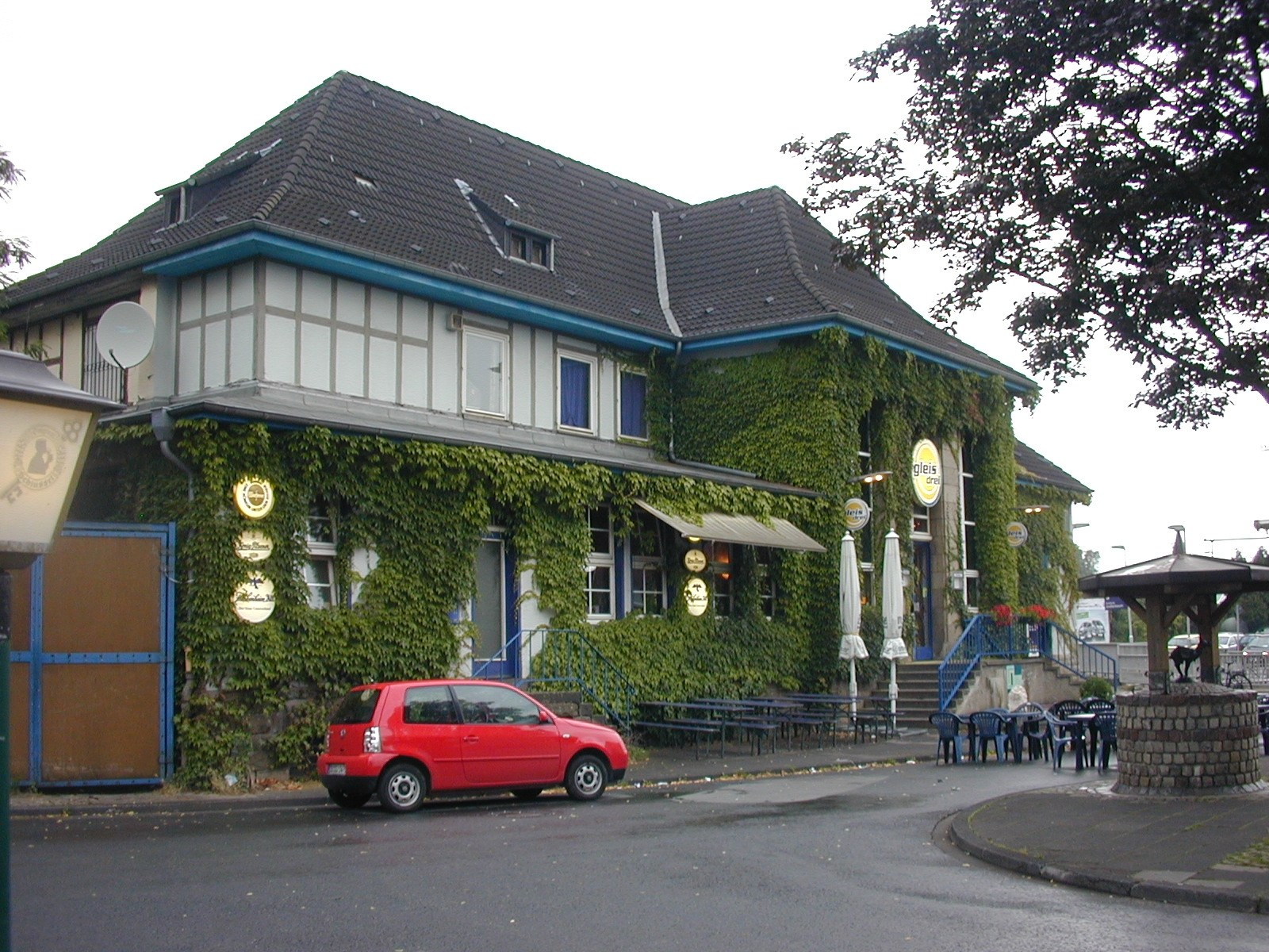 ehemaliger Bahnhof Duisburg Großenbaum